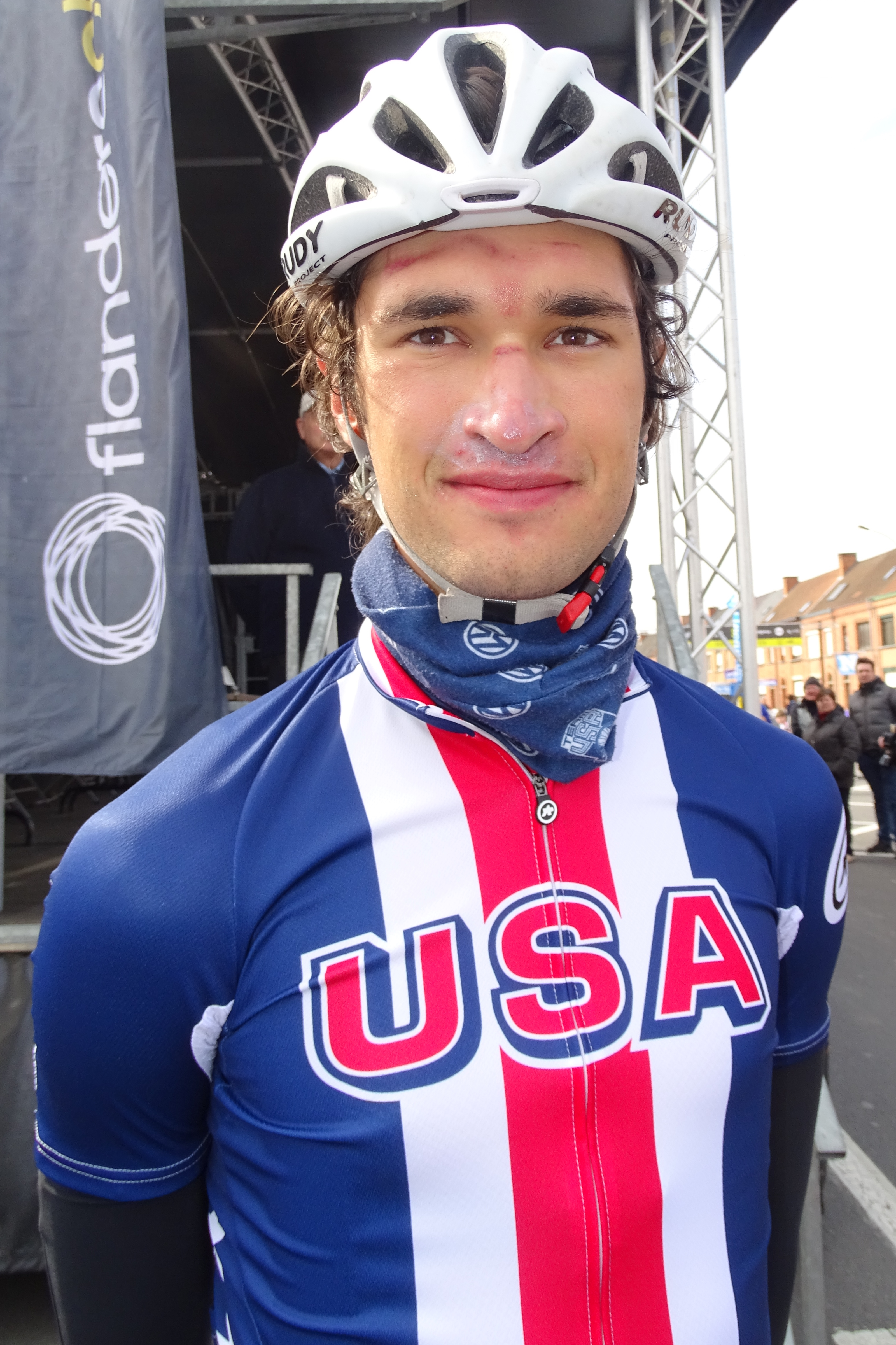 Reportage réalisé le samedi 9 avril à l'occasion du départ et de l'arrivée du Tour des Flandres espoirs 2016 à Audenarde, Belgique.